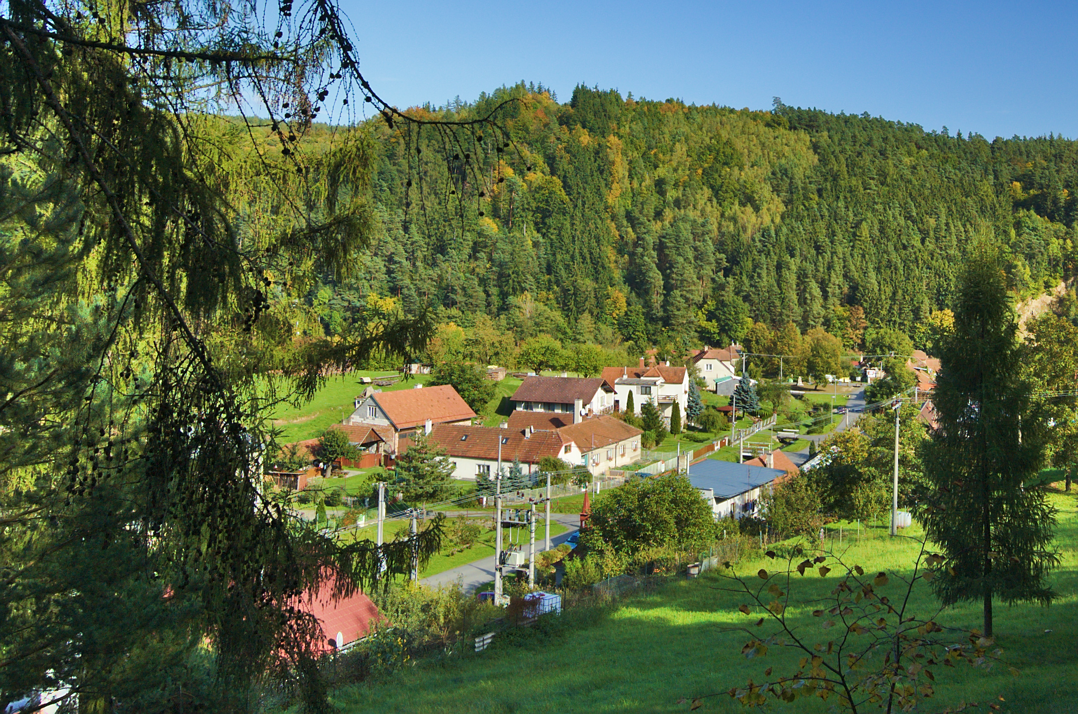 Pohled na obec od západu, Maleny, Stražisko, okres Prostějov